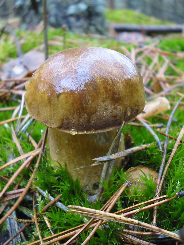 Podgrzybek brunatny (Xerocomus badius)